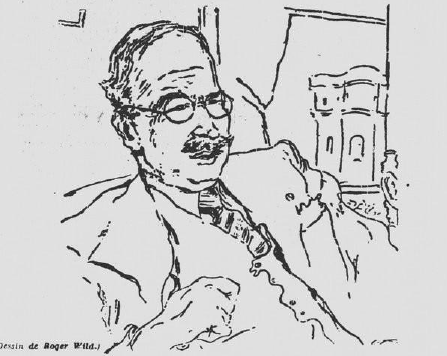 Dessin illustrant 'un article des Nouvelles Littéraires du 16 décembre 1933: "Une heure avec Camille Bloch"